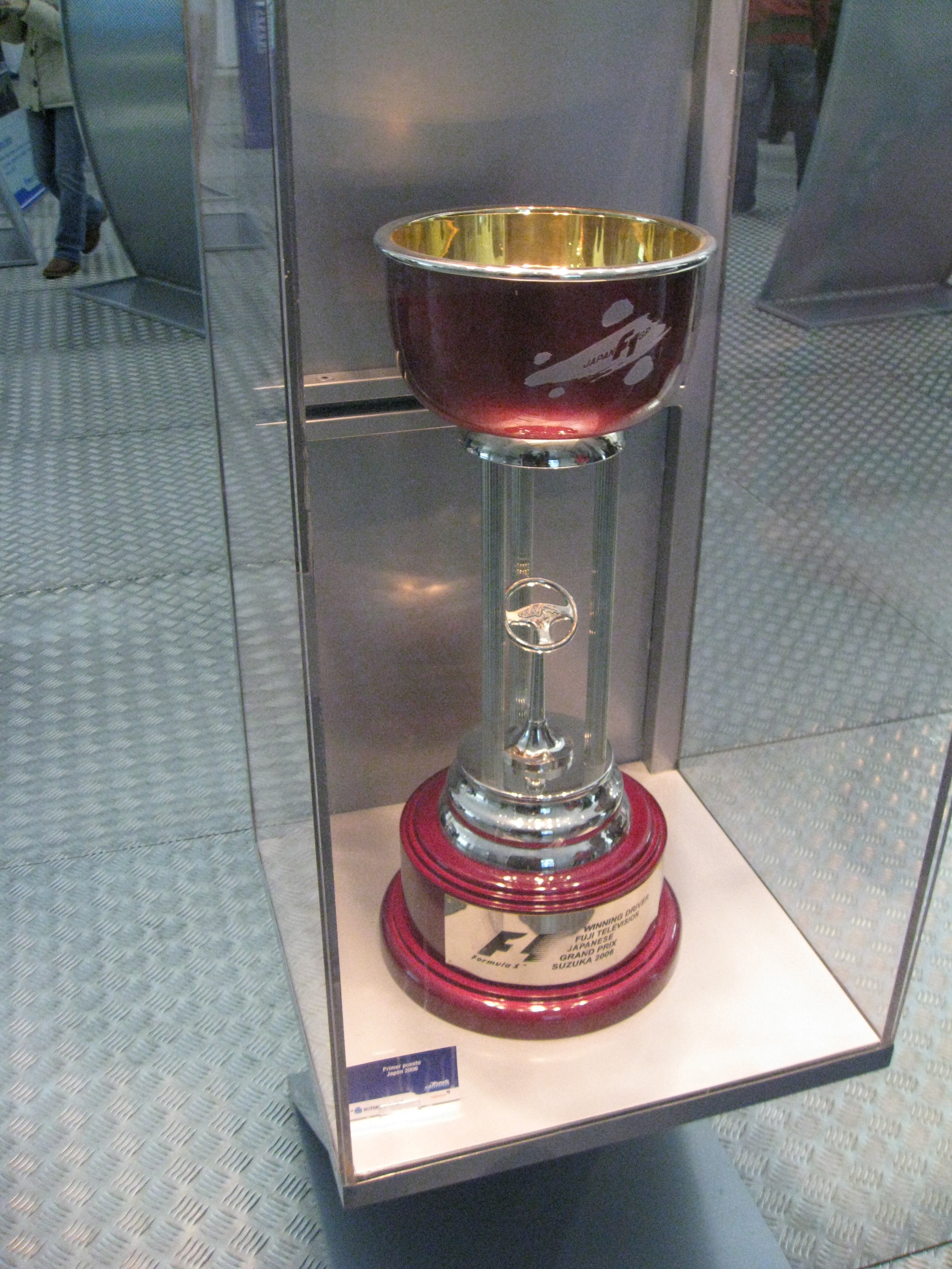 Trofeo del gran premio de Japón en Suzuka, primer puesto de Fernando Alonso